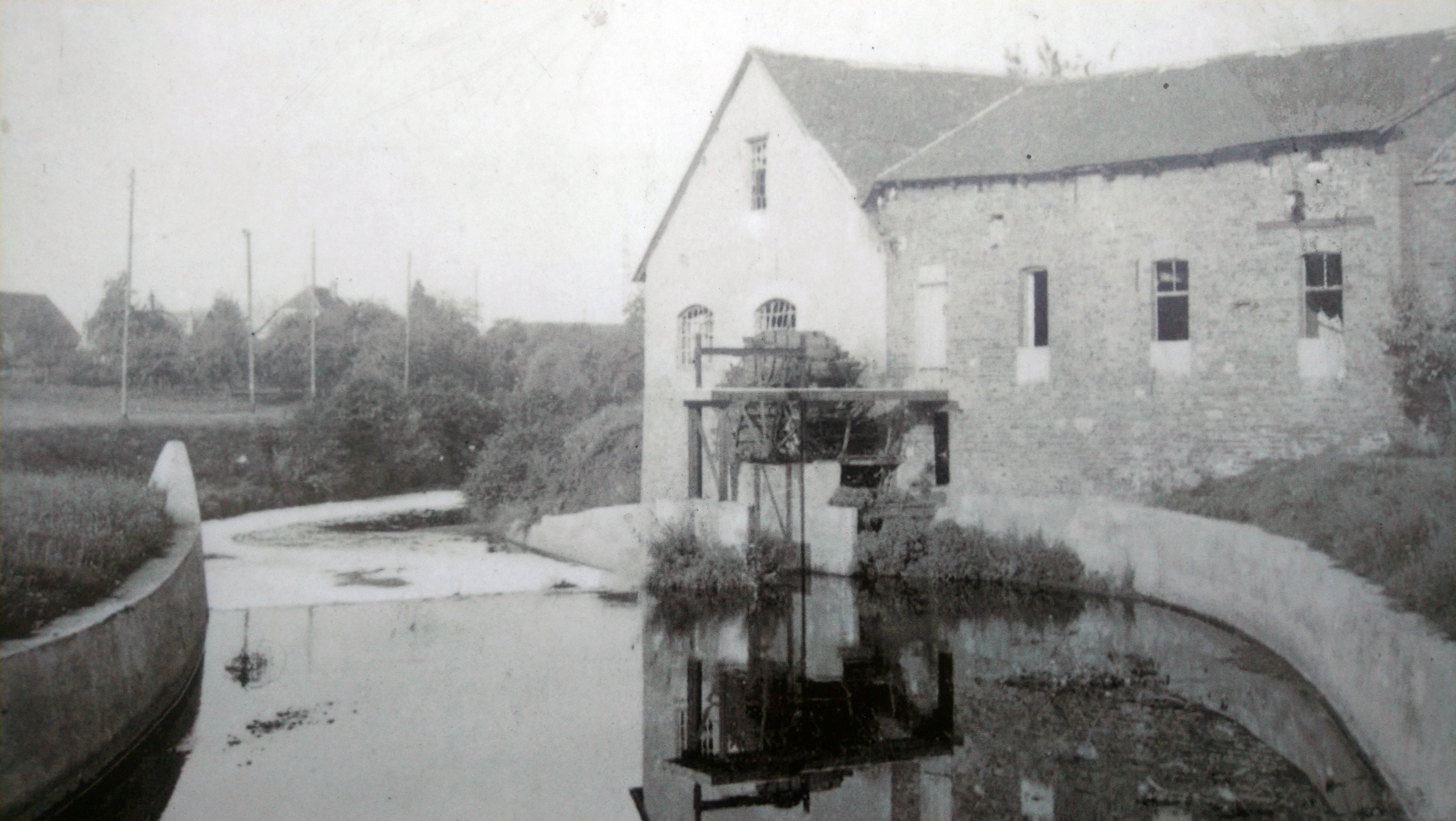 Die Naßmühle bei Großkrotzenburg nach der Kahlverlegung